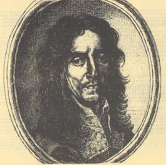 Portrait of A M Bartolotti after his Secondo libro (Rome, 1655)